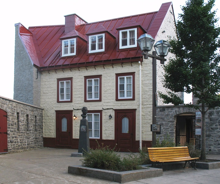 Maison Joseph-Canac-Dit-Marquis (ou Alphédé-Gagné-Roy), Ville de Québec, Québec, Canada. 64, côte de la Montagne. Maison érigée sur l'un des plus anciens sites de la ville, classée bien culturel du Québec en 1968.